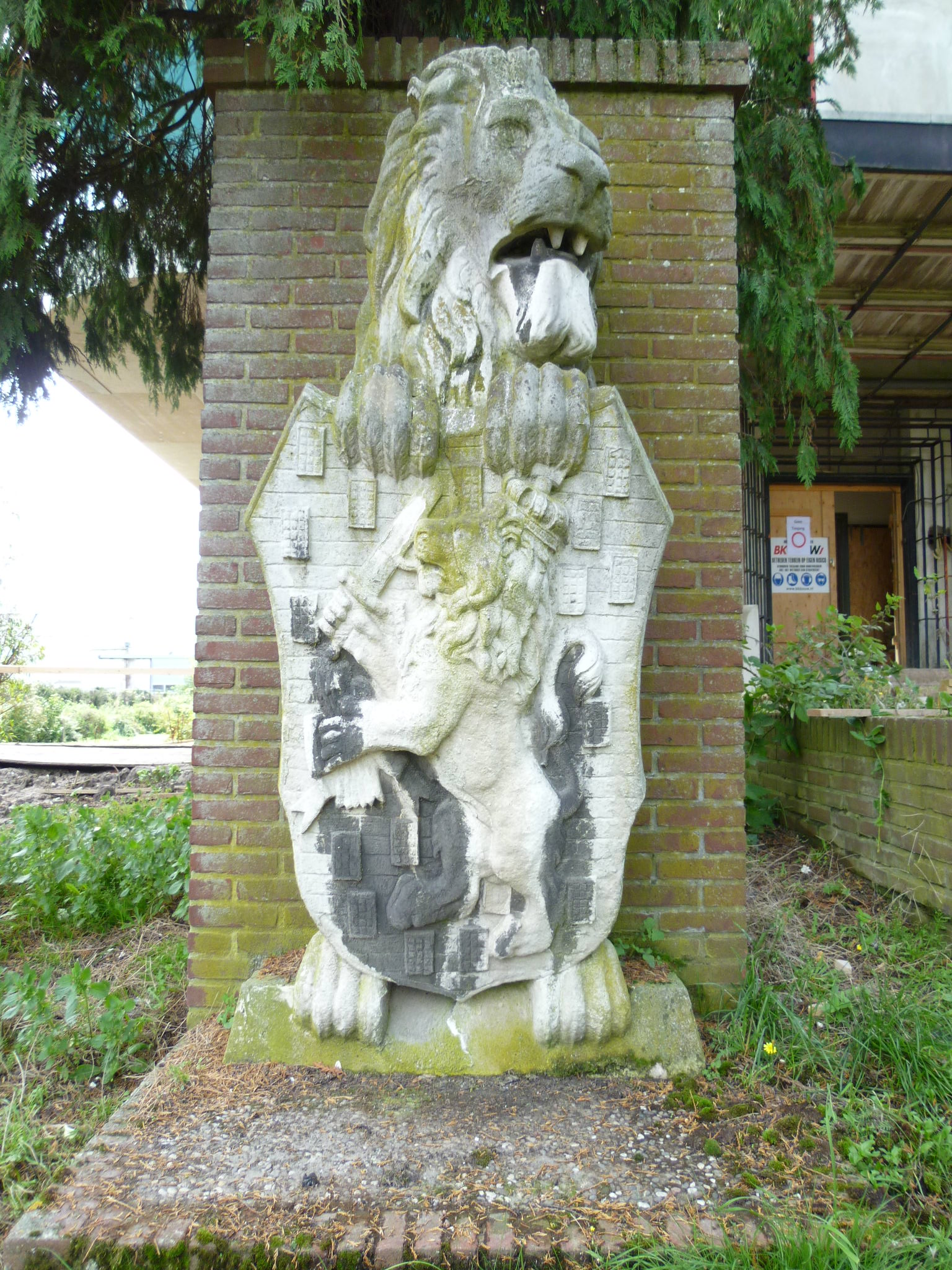 1 van de 2 soortgelijke beeldhouwwerken van de voormalige Van Sypesteynkazerne geplaatst naast Villa Jongerius te Utrecht. Zie ook achterzijde van dit beeldhouwwerk hier